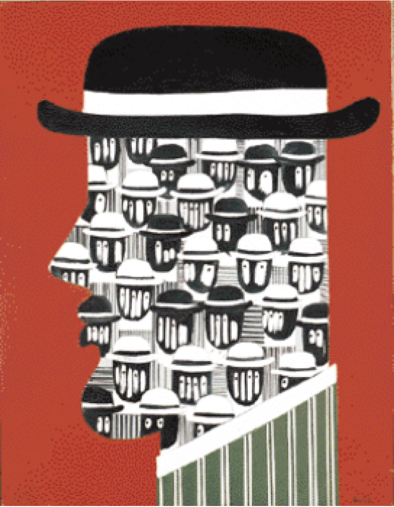 Tableau Yannis Gaïtis